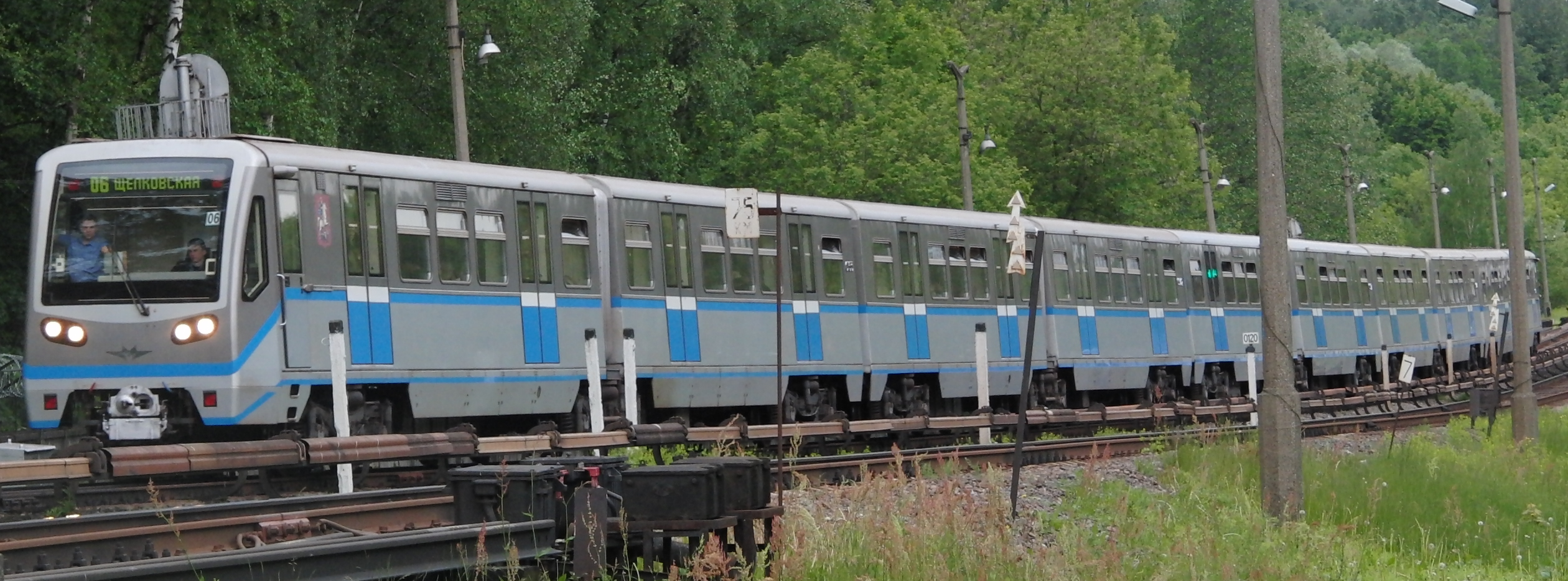 Прибытие поезда на станцию «Измайловская» от станции «Партизанская».